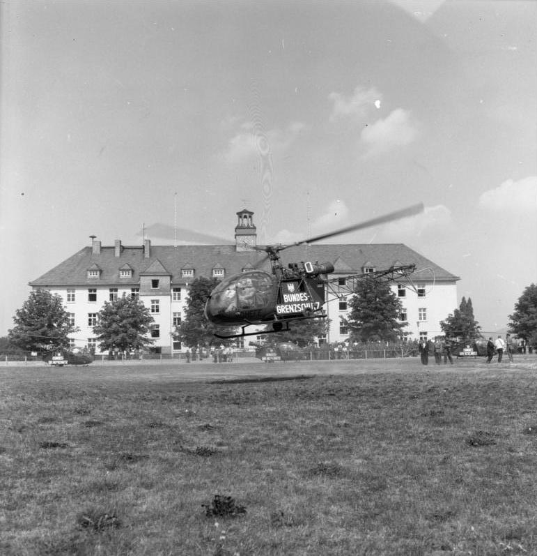 Zonengrenzfahrt, Bundespräsident Lübke BGS Eschwege